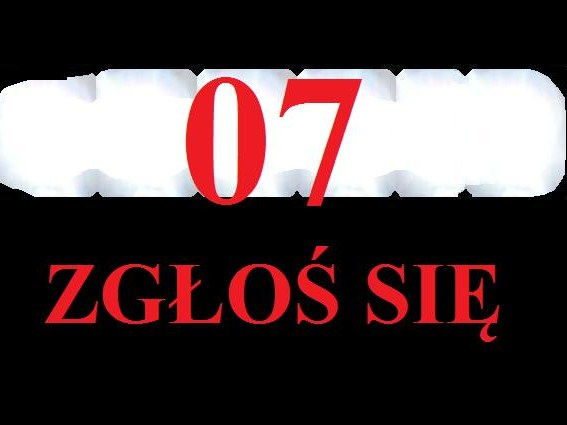 Plansza na wzór czołówki serialu kryminalnego „07 zgłoś się” (1976-1987).